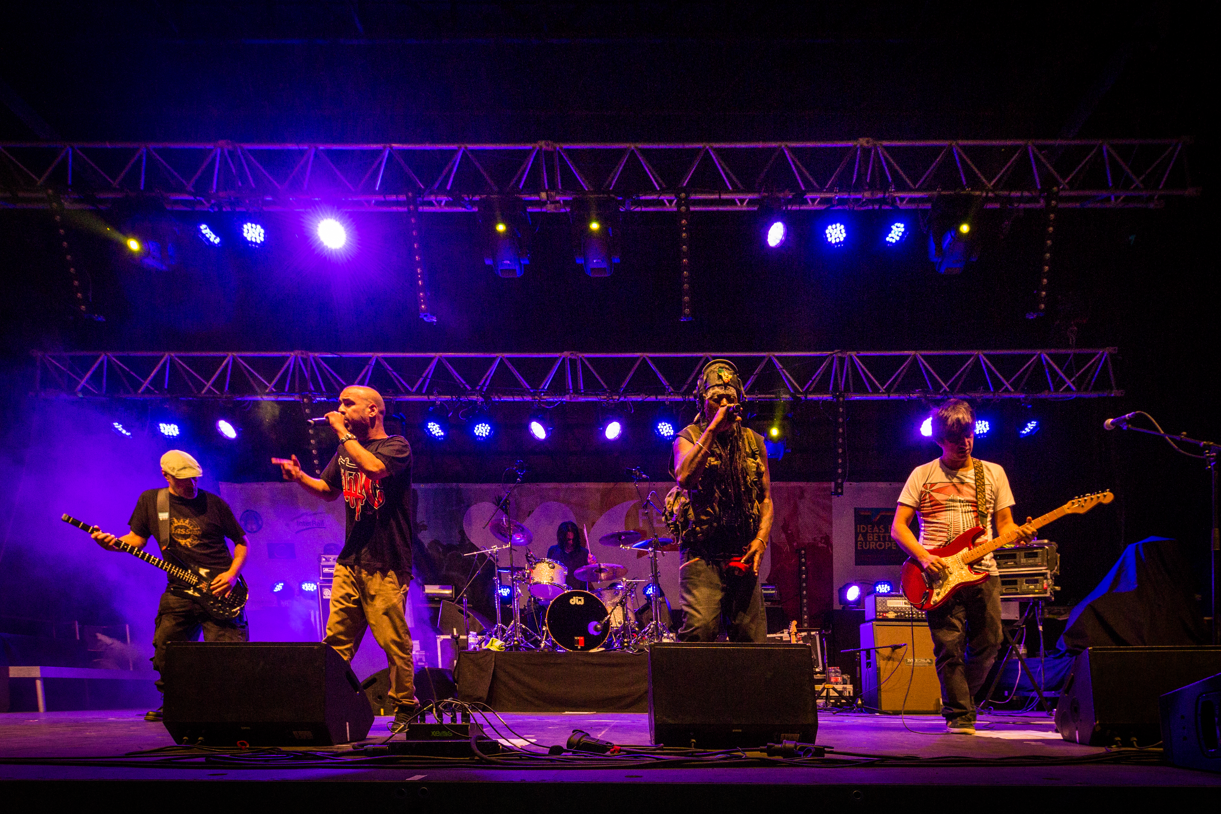 Asian Dub Foundation à la YOFEST2014 à Strasbourg 9 mai 2014